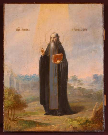 Никон Великий - ? - 1088 р. Ігумен Печерського монастиря (1077-1088), письменник. Преподобний. Пам'ять 11 жовтня і 5 квітня. Найперший постриженик прп.Антонія. Никон Великий мав сан священика, тому прп. Антоній доручав йому постригати братію в чернецтво. Його авторитет був дуже великий. Історик М.Д.Присєлков навіть висловив гіпотезу, згідно з якою під ім'ям Никона в печері переховувався колишній митрополит Київський Іларіон (1051-1054), що прийняв велику схиму. Прп. Никон постригає в ченці двох знатних вельмож - боярського сина Варлаама і князівського управителя Єфрема. Це викликало гнів князя Ізяслава, який хотів ув'язнити Никона. Преподобний змушений був залишити монастир і піти в далеку Тмутаракань. Там він будує церкву Богородиці й засновує монастир. У 1066 р. Никон повертається в Печерський монастир, де користується великою повагою серед братії. Його постриженик, а тепер ігумен, Феодосій, доручав йому, разом із Стефаном, читати з книг проповіді братії. За відсутності Феодосія Никон заступав ігумена. Однак у 1073 р., підчас чергової князівської міжусобиці Никон знову змушений тікати до Тмутаракані. Повертається лише по смерті Феодосія (3 травня 1074 р.) У 1077 р. його самого обирають печерським ігуменом. За час ігуменства Никона був прикрашений мозаїкою і розписаний фресками Успенський собор. Доведено авторство Никона Великого до літописного тексту "Повісті минулих літ" 1055-1073 років. Заслуга Никона полягає в тому, що він перший створив систематичний виклад української історії. Його мощі спочивають у Ближніх печерах.